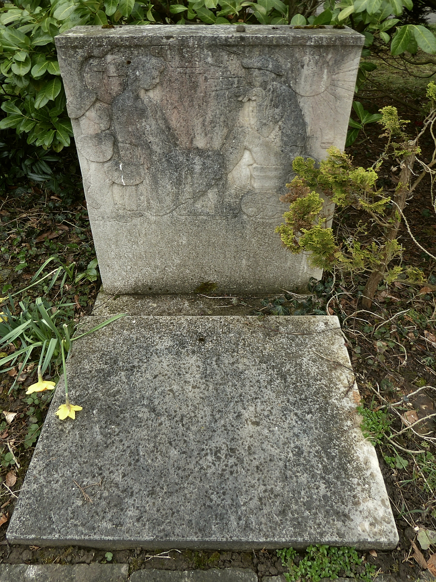 Elisabeth Gerter (1895–1955) Sozialkritische Schriftstellerin, Dichterin, Politikerin, Grab auf dem Friedhof Hörnli, Riehen, Basel-Stadt